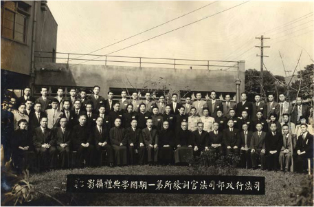 中文（台灣）: 司法行政部司法官訓練所第一期開學典禮師生合影。